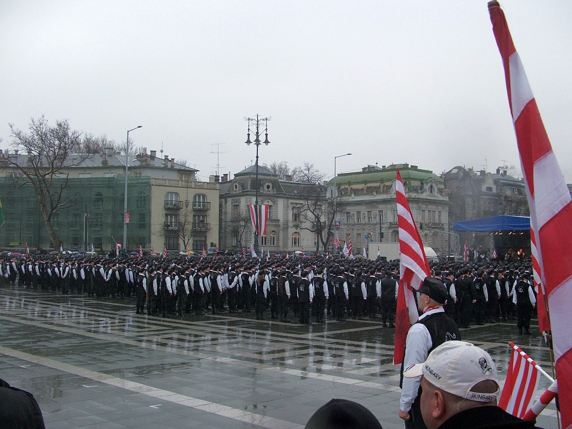 A Magyar Gárda avatása 2009. március 15-én (Budapest, Hősök tere)